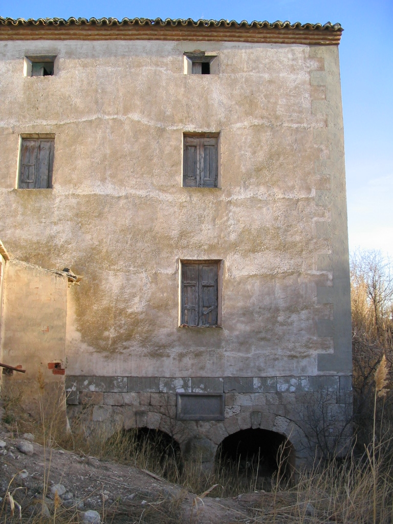 Molino harinero antiguo situado dentro del urbanismo del pueblo al final de la calle Gil Sastre de Épila.